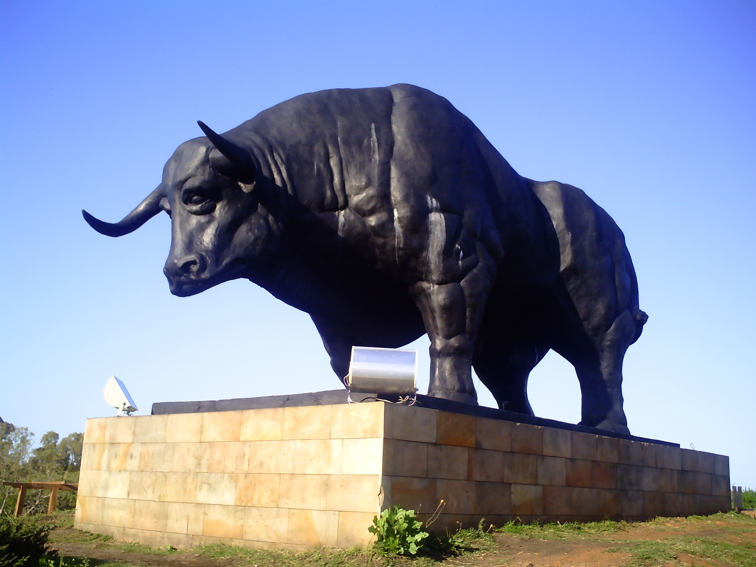 Monumento ubicado en la Plazoleta "El Toro" en Paso de Los Toros (Tacuarembó - Uruguay)